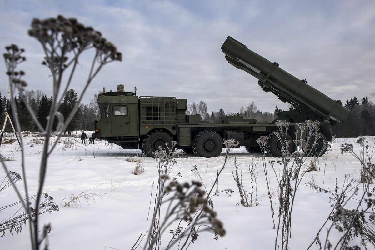 Ураган-1М - Тренировка курсантов Михайловской военной артиллерийской академии в стрельбе из артиллерийских орудий и вождении военной техники